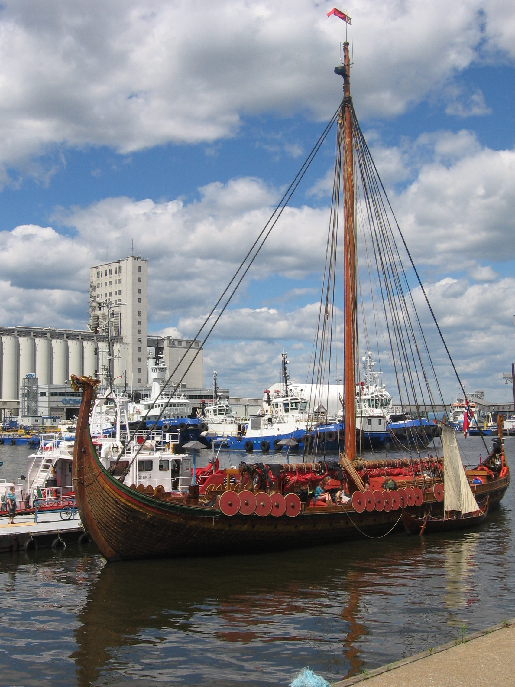 Drakkar Viking